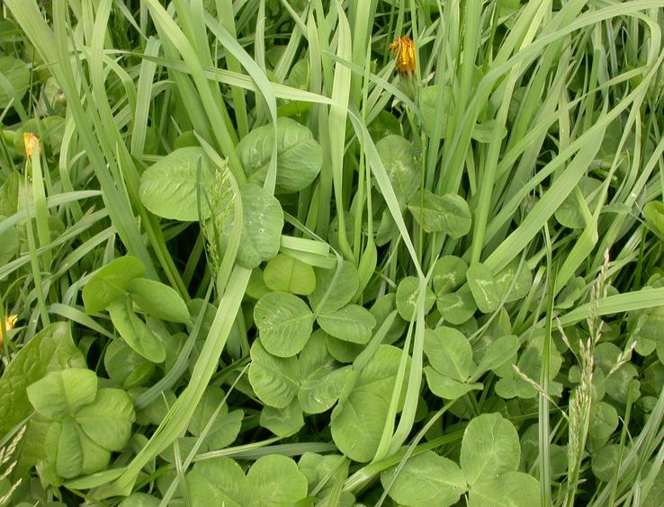 Wiesenneuanlage mit bester Futterqualät mit Knaulgras, Rotklee (Trifolium pratense) und Raygras in Deutschbach, Niederösterreich